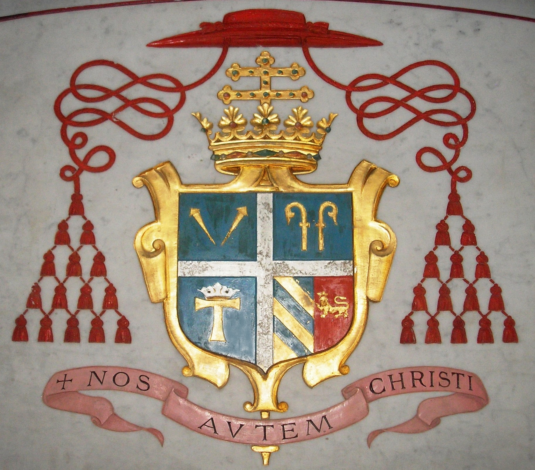 Blason du cardinal Victor Lecot (archevêque de Bordeaux de 1890 à 1908), visible dans la cathédrale Saint-André de Bordeaux.